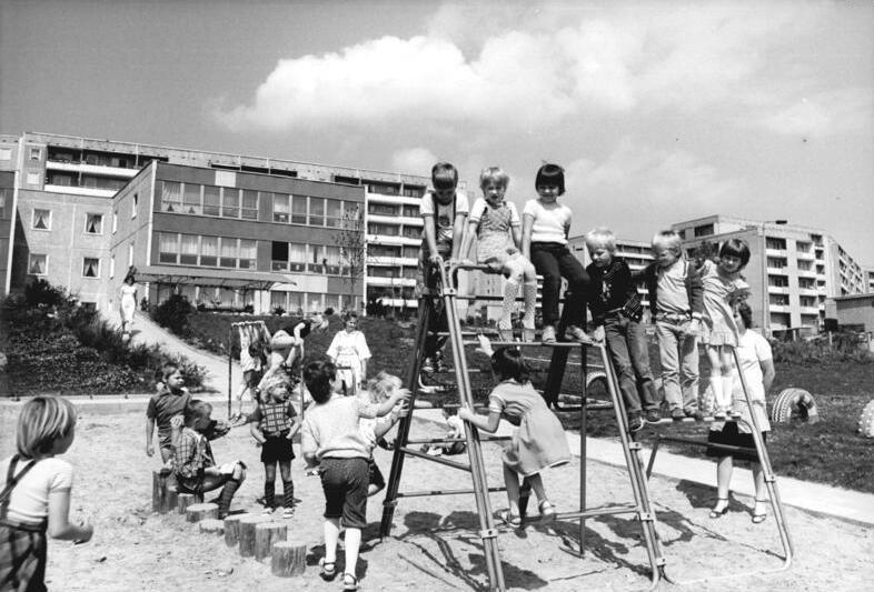 Ilmenau, Wohnblocks, Spielplatz ADN-ZB Schaar 28.8.84 Bezirk Suhl: Neues Wohngebiet- Für Tausende Werktätige der Kreis- und Hochschulstadt Ilmenau haben sich die Wohnbedingungen in den vergangenen Jahren grundlegend verbessert. Auf der Pörlitzer Höhe entstand neben vielen neuen Wohnungen auch Schulen, Turnhallen und Kindereinrichtungen. Während die Eltern vorwiegend in den vier modernen Industriebetrieben ihrer Arbeit nachgehen, wissen sie ihre Kleinen in guter Obhut. -siehe auch 1984-0828-3N- Information added by Wikimedia users.Zu sehen ist der Kindergarten an der Humboldtstraße, in dem sich jetzt die private Assisi-Schule befindet. (Michael Sander)